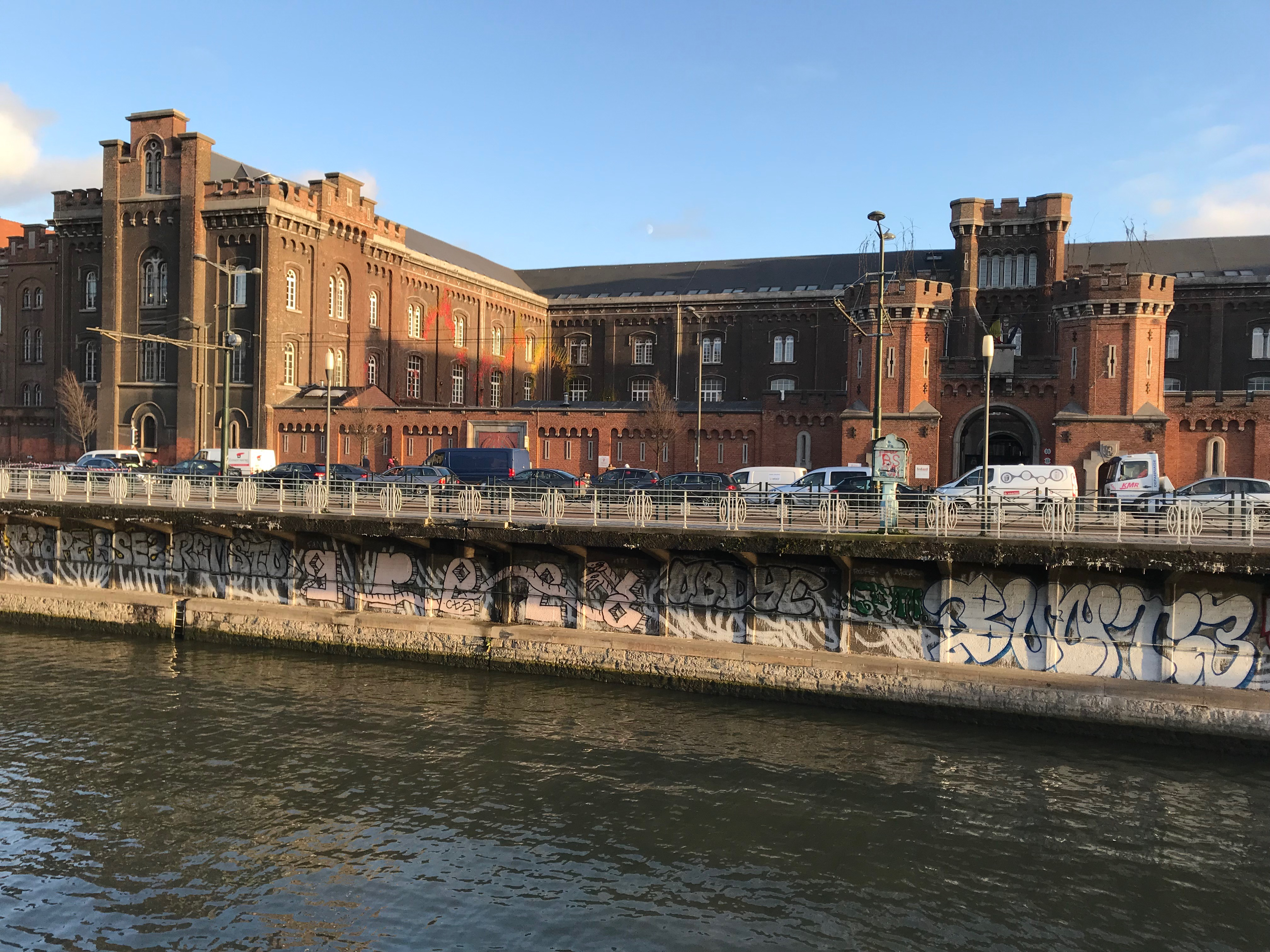 Ancienne Caserne du Petit Chateau